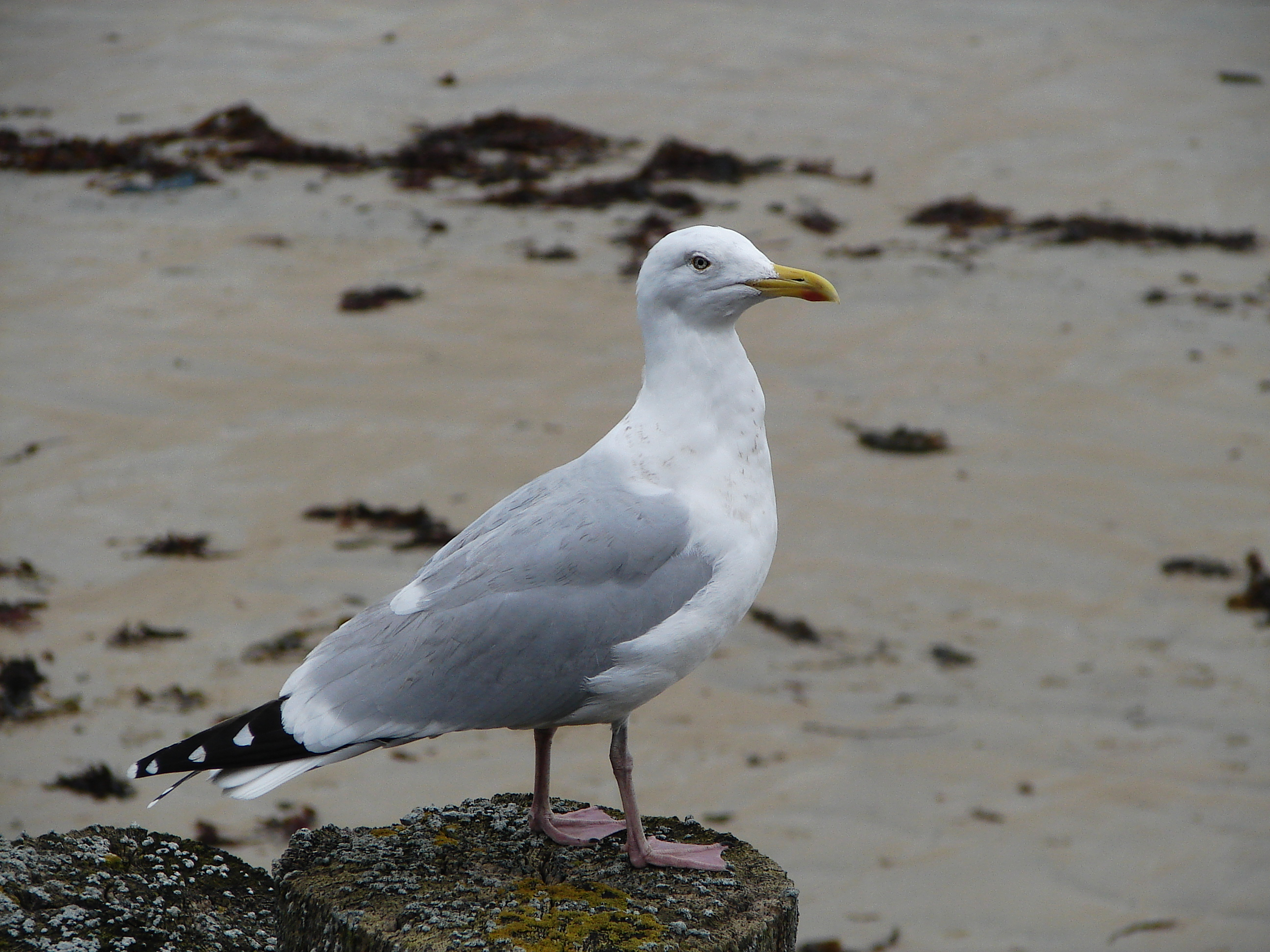 Lieu : Saint Malo (Bretagne / France) Goéland argenté adulte (Herring Gull)